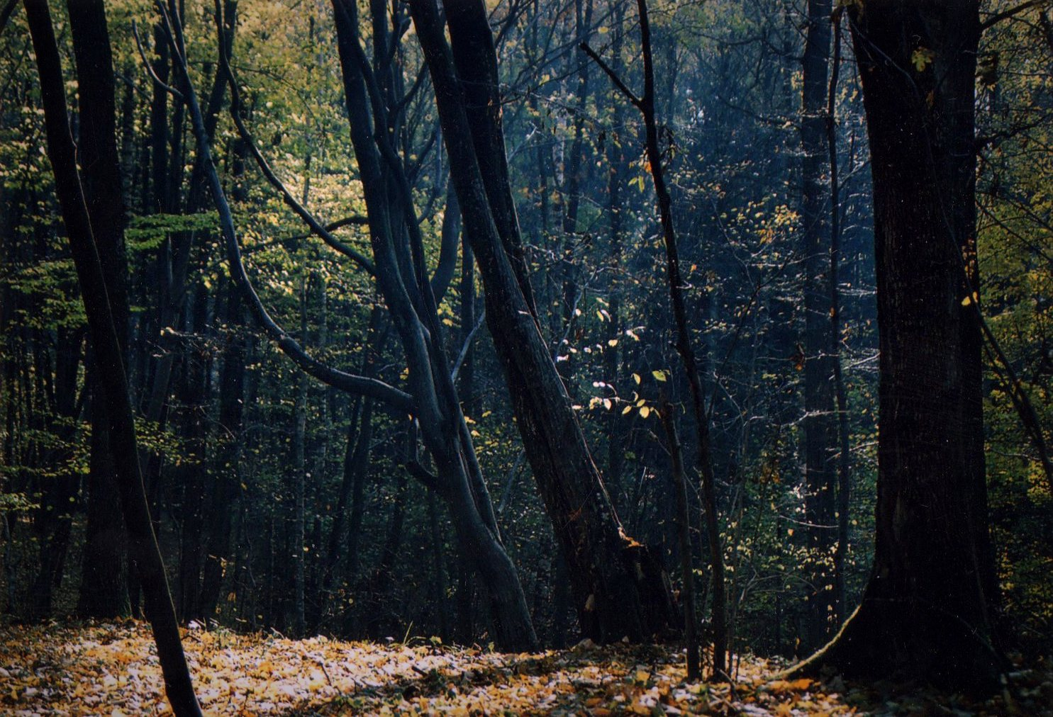 Autor: Adrian Grzegorz